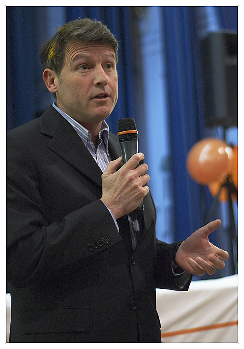 Vincent Peillon lors du Banquet Républiquain du Nouveau Parti Socialiste le 21/04/2005.